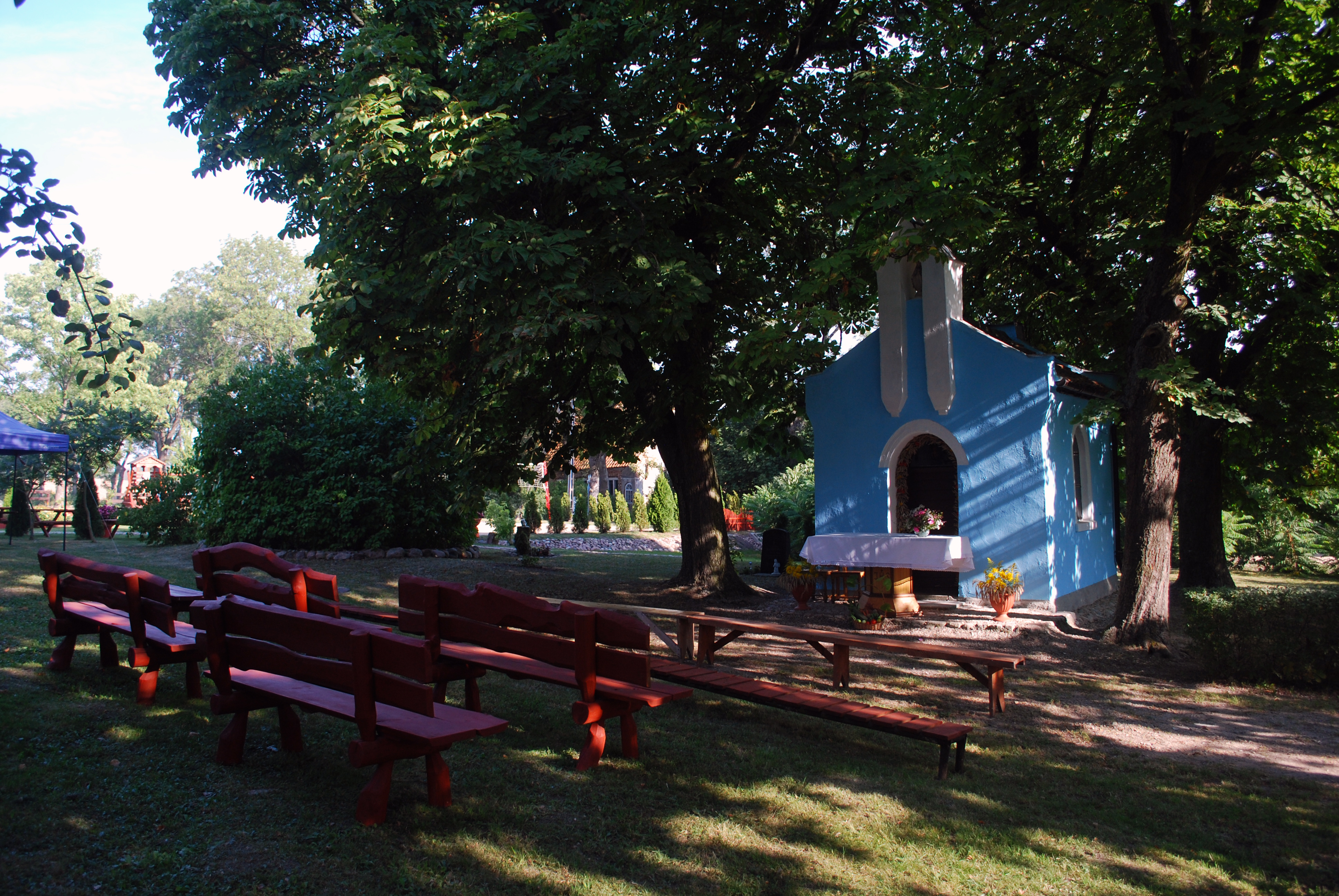 Pielgrzymka do kapliczki Matki Boskiej Częstochowskiej w Nowej Wsi Reszelskiej - Kapliczka Matki Boskiej Częstochowskiej